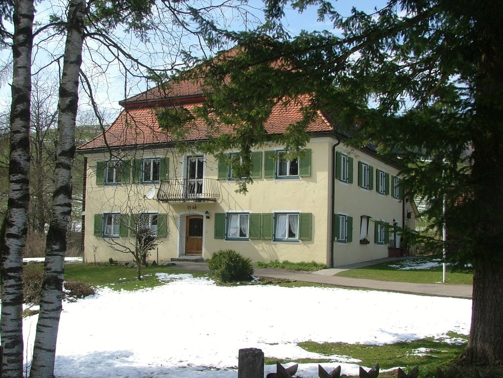 Pfarrhof